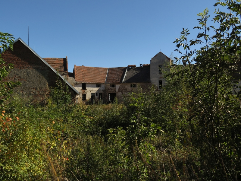 Vodní hrad Janovice nad Úhlavou, Janovice nad Úhlavou.